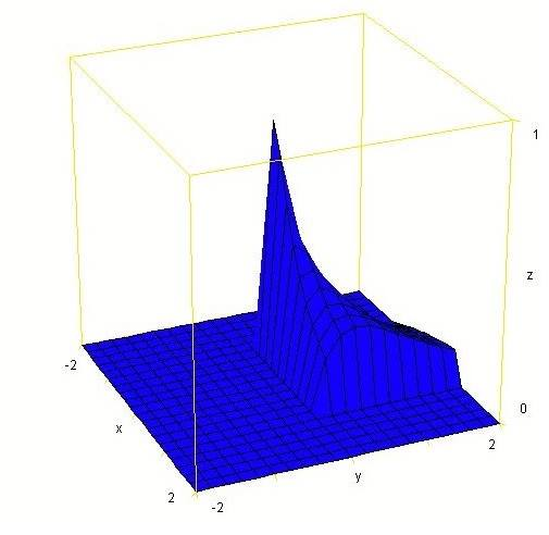 Función de densidad de la cópula.